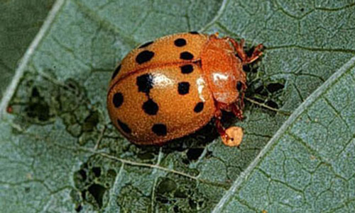 மெக்சிகன் வண்டு